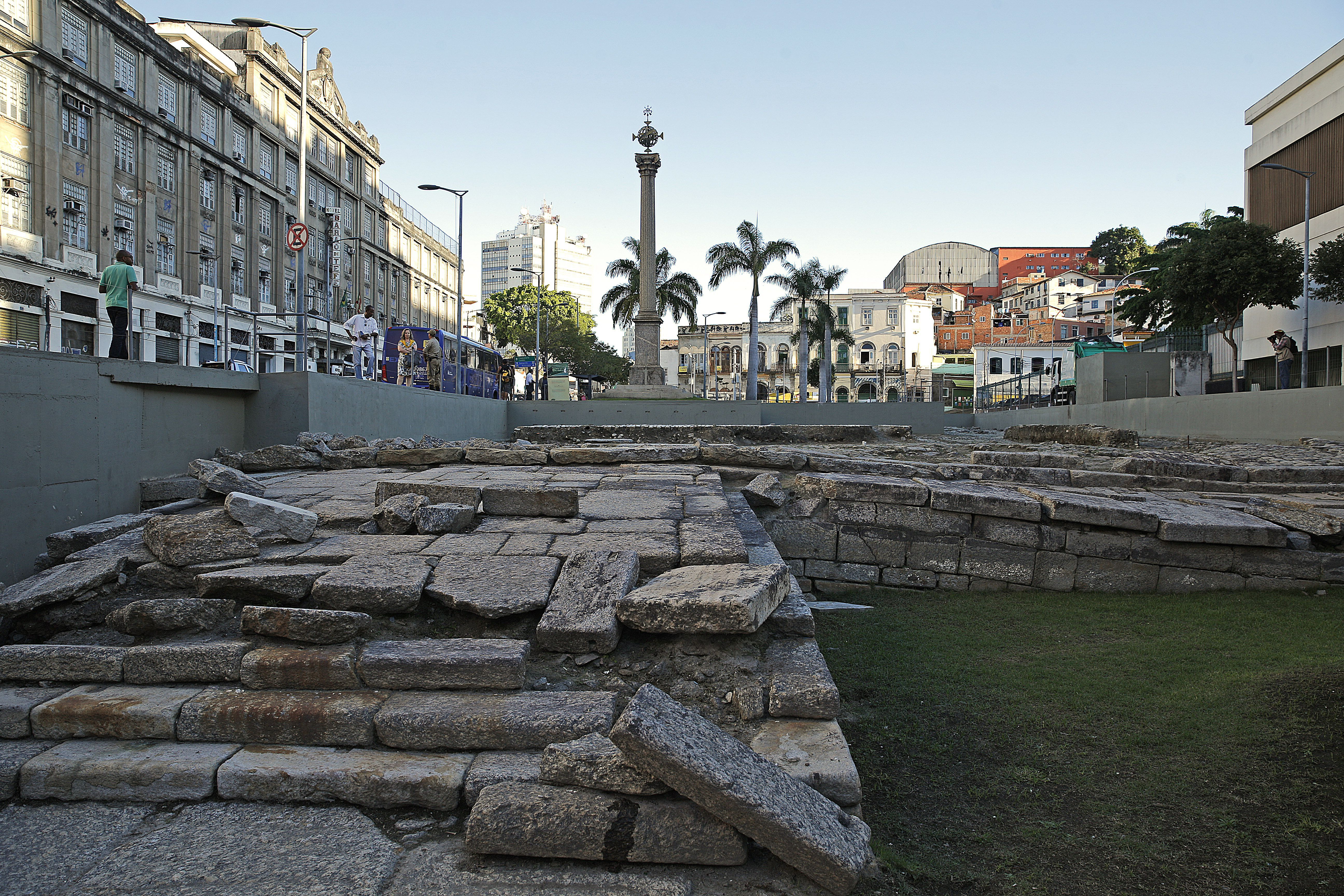 Rio de Janeiro - O Cais do Valongo, principal porto de entrada de escravos nas Américas é reconhecido como Patrimônio da Humanidade pela Unesco (Fernando Frazão/Agência Brasil).